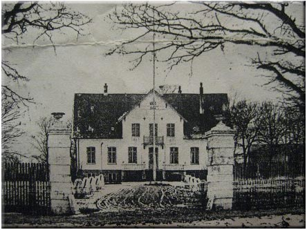 Eksempel på proprietærgård: Herlevgaard